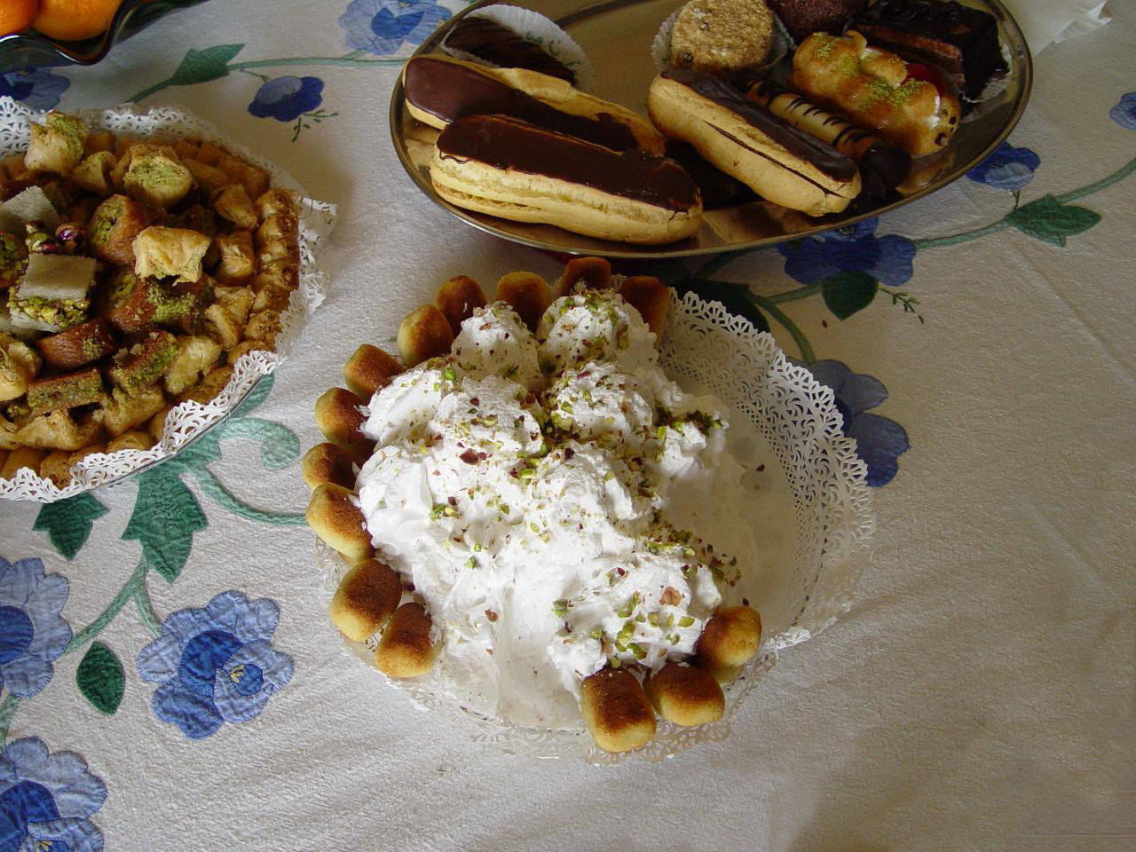 Karabij my favorite!